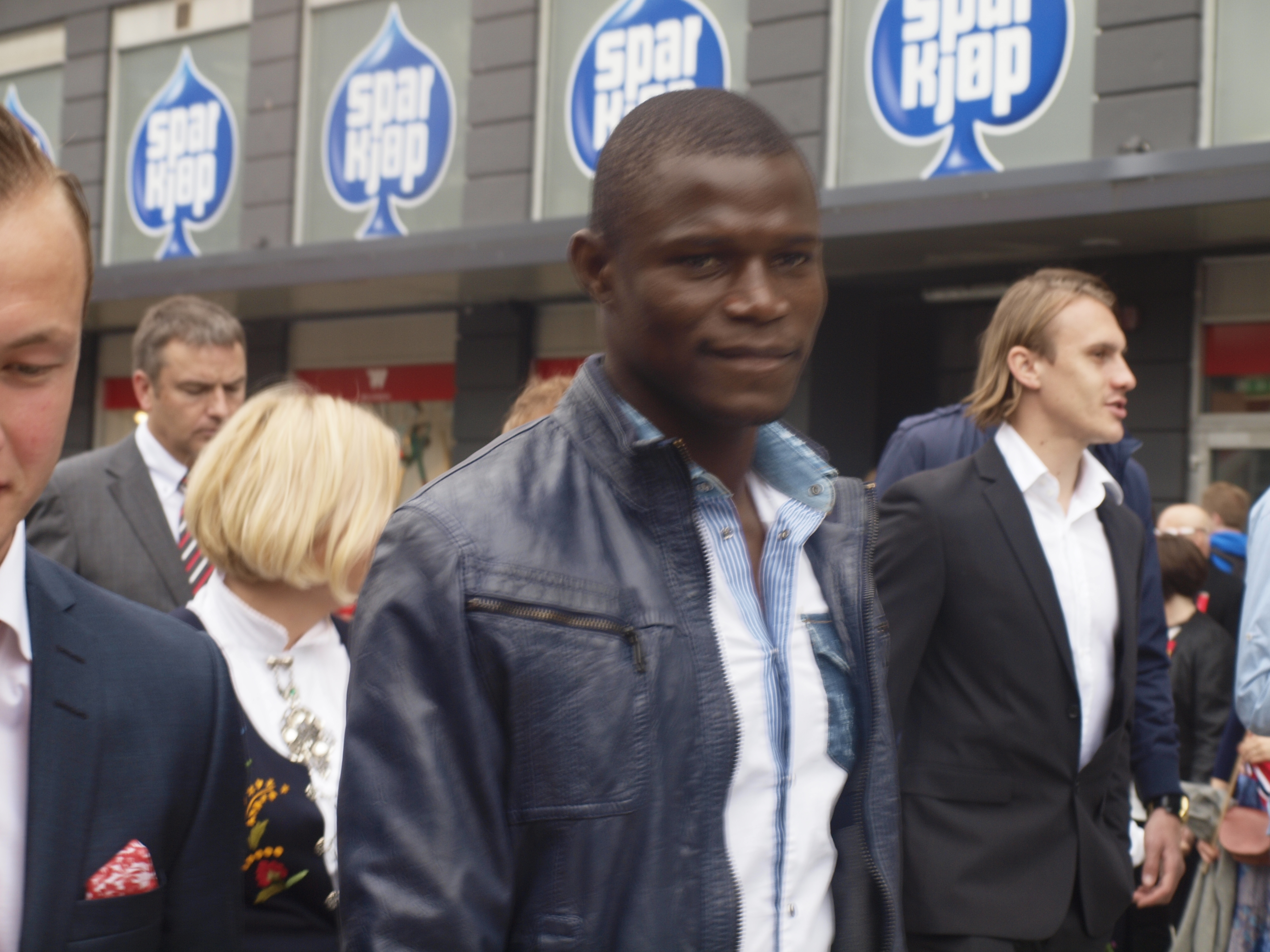 Stephane Badji in 2013